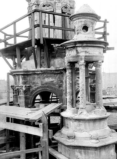 Petit campanile près de l'escalier.